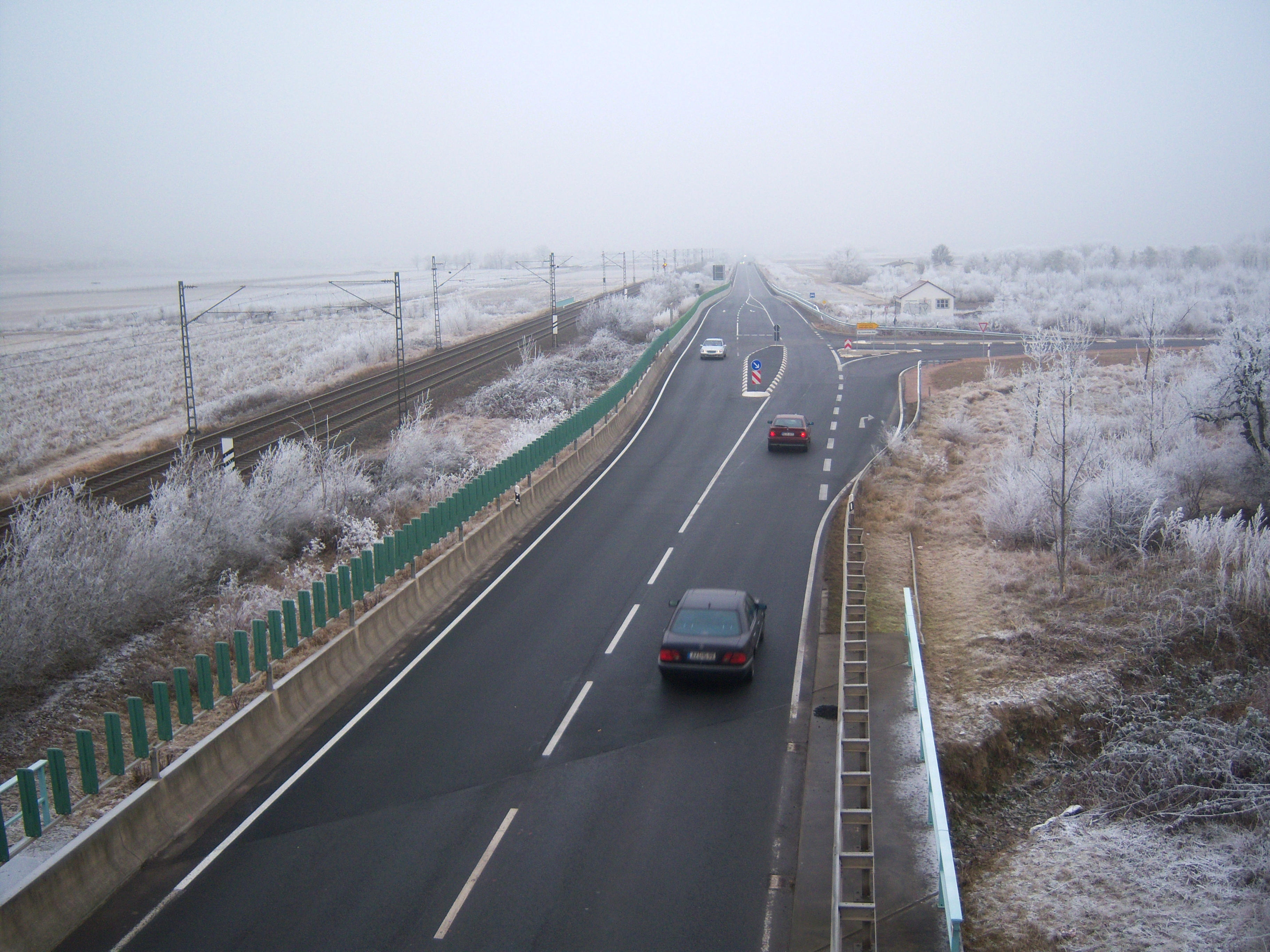 Bundesstraße 9 bei Guntersblum, links die Bahnstrecke Mainz–Mannheim